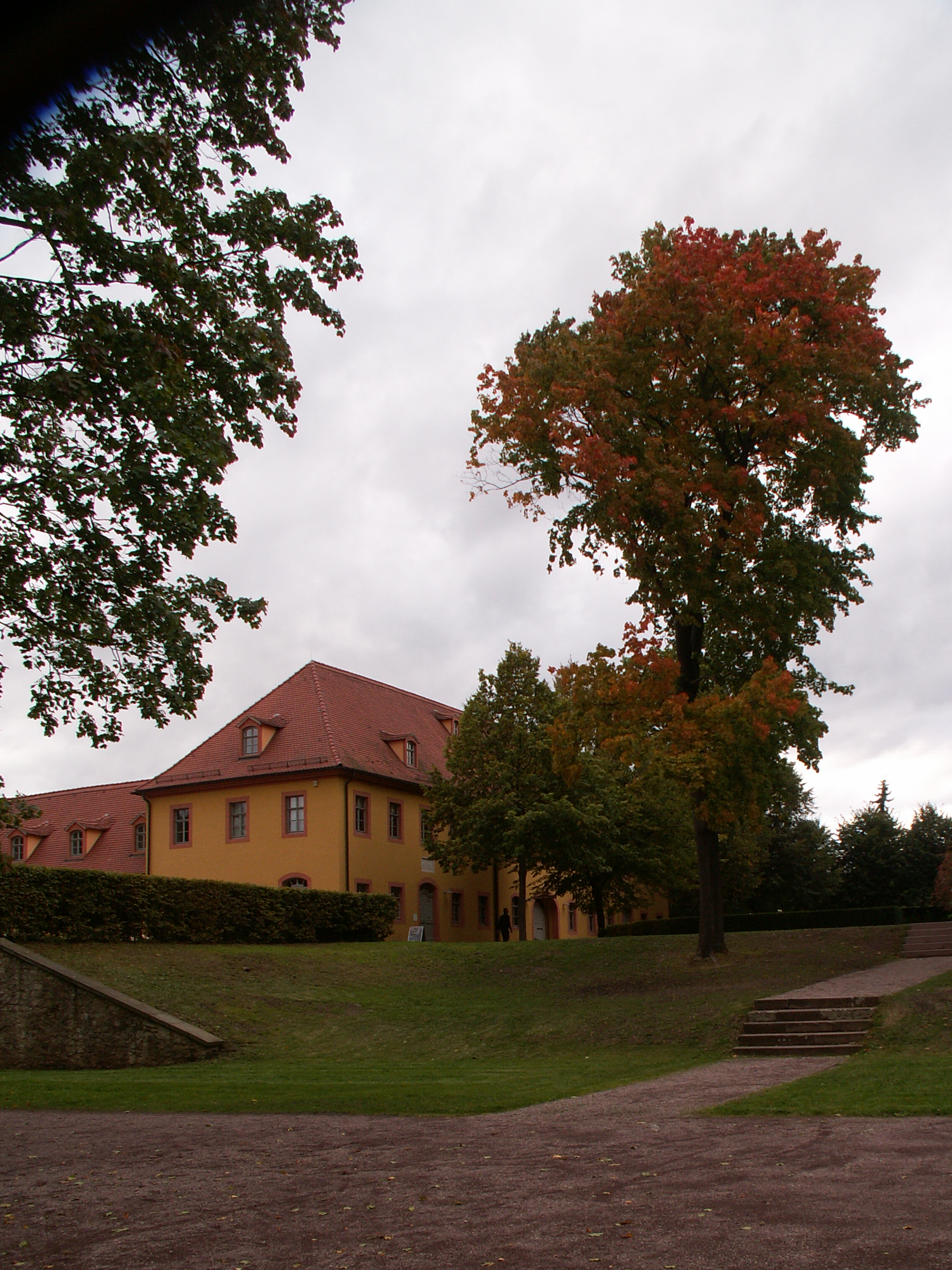 Wielandgut (Ansicht vom Park des Gutes)